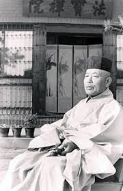 Thiền sư Hàn Quốc hiện đại.